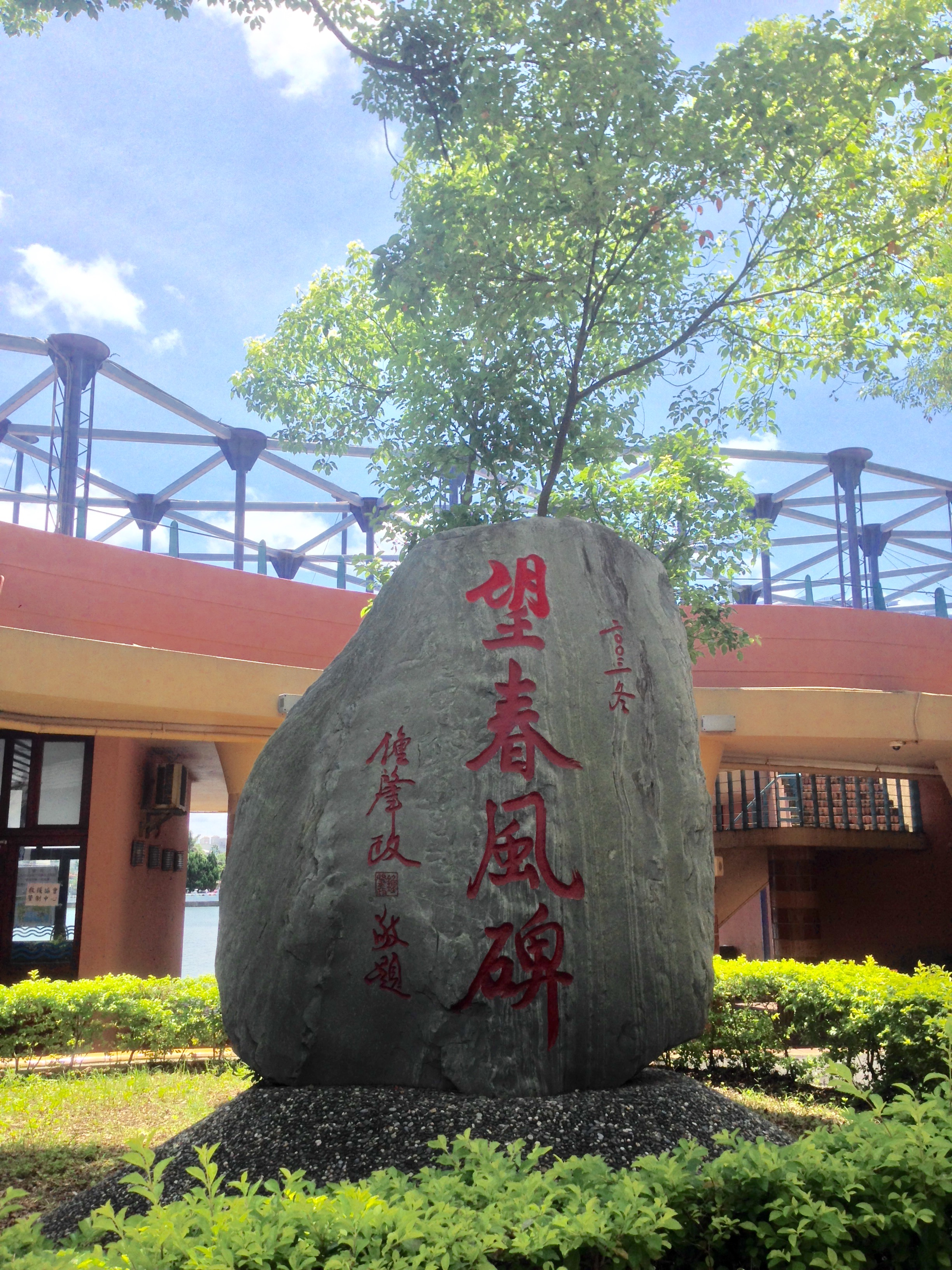 中文（台灣）: 龍潭大池望春風碑，2003年冬季鍾肇政題字。